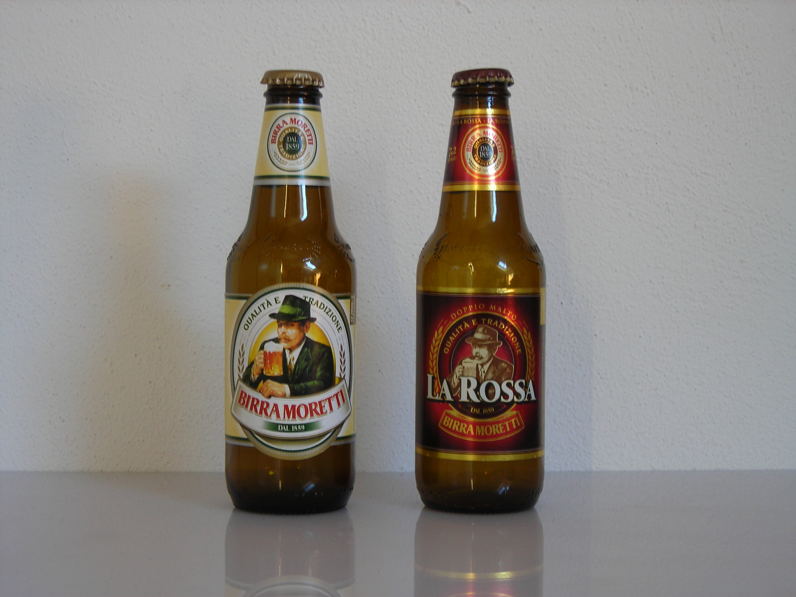 Bottiglie di birra Moretti.